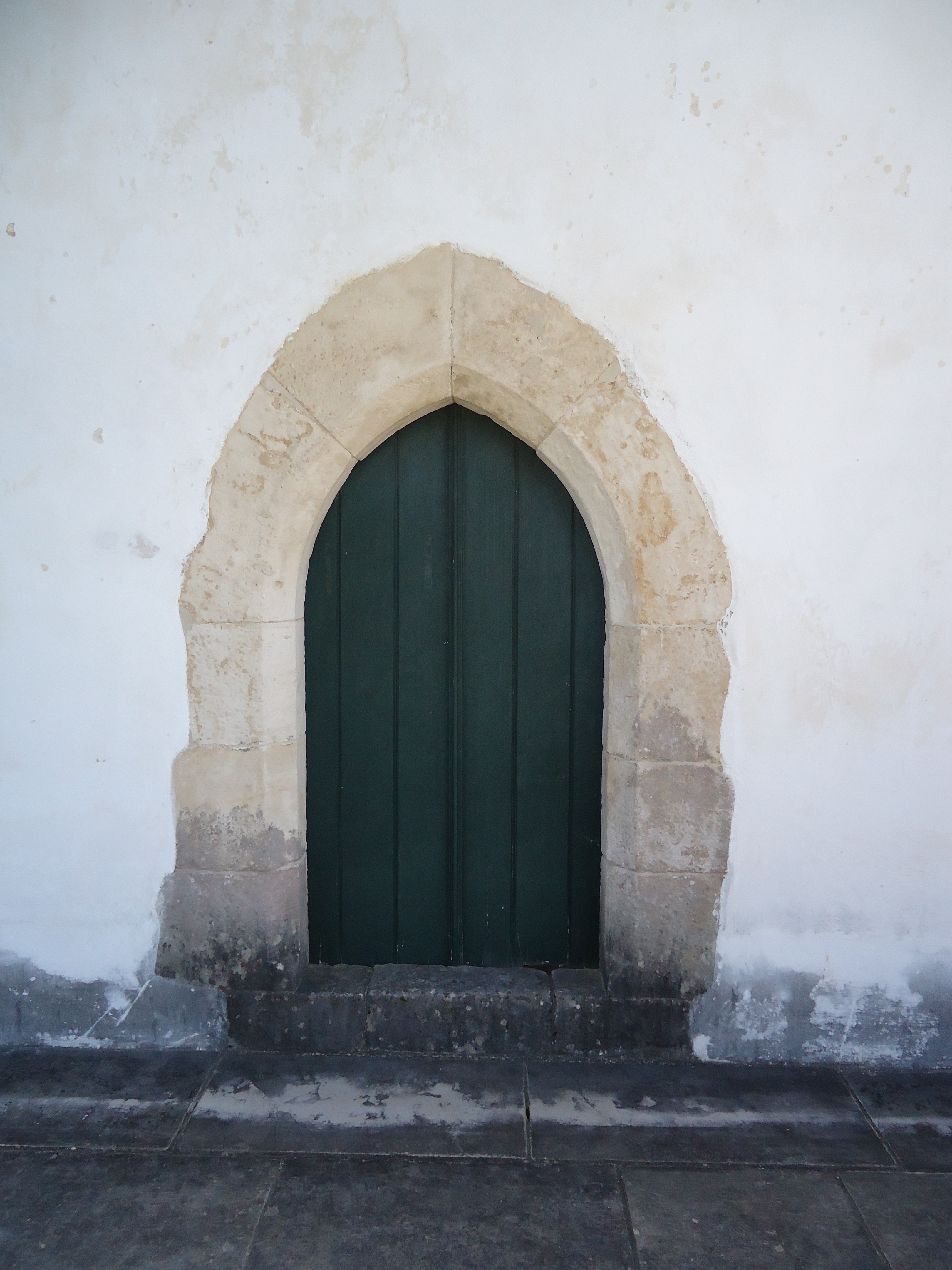 Capela de São Jorge, Centro de Interpretação Batalha de Aljubarrota, freguesia de Calvaria de Cima, concelho de Porto de Mós, distrito de Leiria, Portugal: porta norte, em arco quebrado.